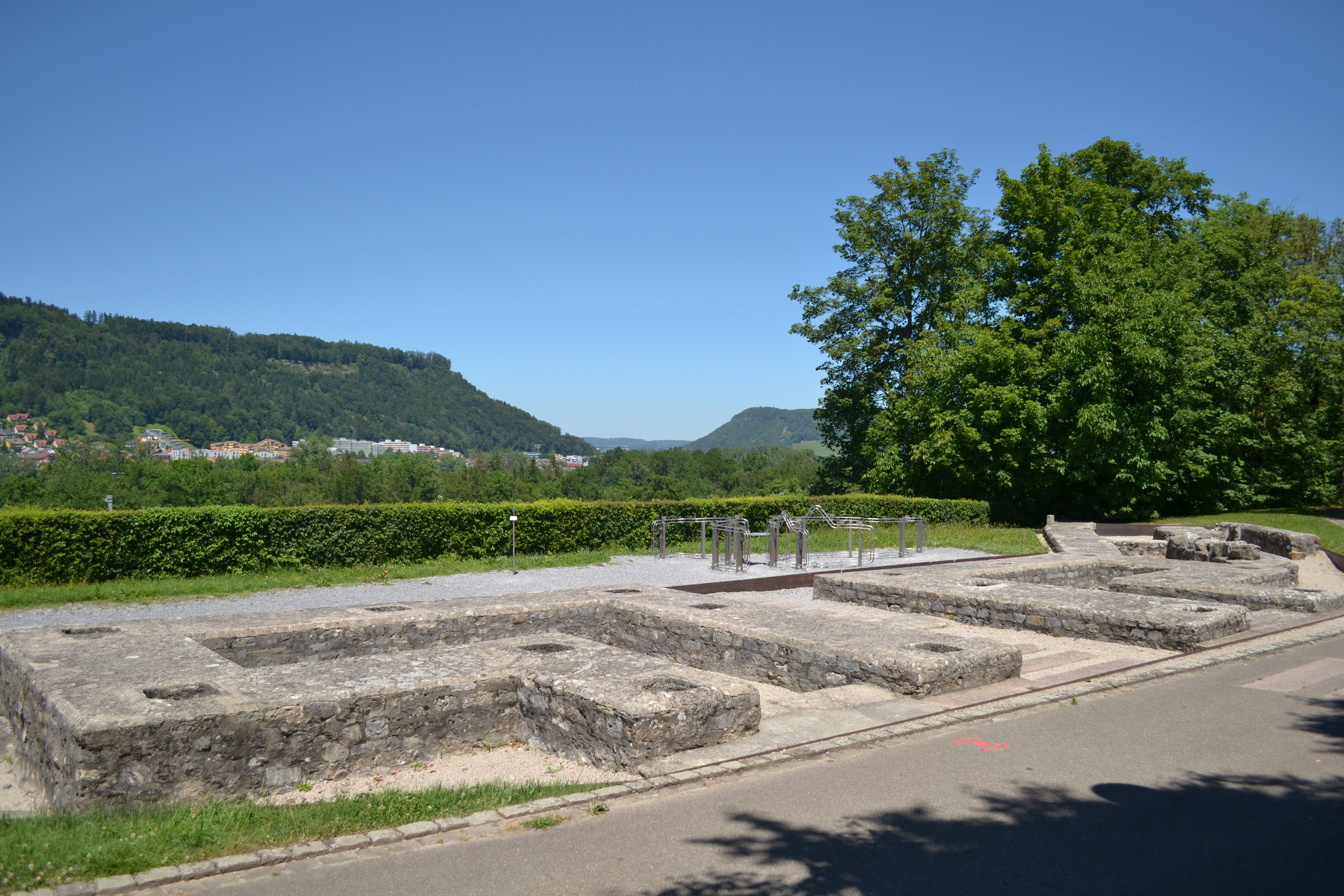 Vindonissa Nordtor Legionärspfad Vindonissa - Station IV: Porta Decumana Fundamente zweier hakenförmig einspringender Türme, die typisch waren bei Legionslagern des mittleren 1. Jh. n. Chr. Es liegt an der Nordböschung direkt über dem Steilabfall des Plateaus und besitzt nur einen Durchgang. Das Nordtor war weder für den Strassenverkehr noch militärisch von Bedeutung. Es diente vor allem der Zufuhr von Waren, die am Aareufer angelandet, und der Abfuhr von Müll, der westlich des Tores auf dem "Schutthügel" deponiert wurde. Im Hintergrund ist der Einschnitt der Aare durch die Jurakette erkennbar.